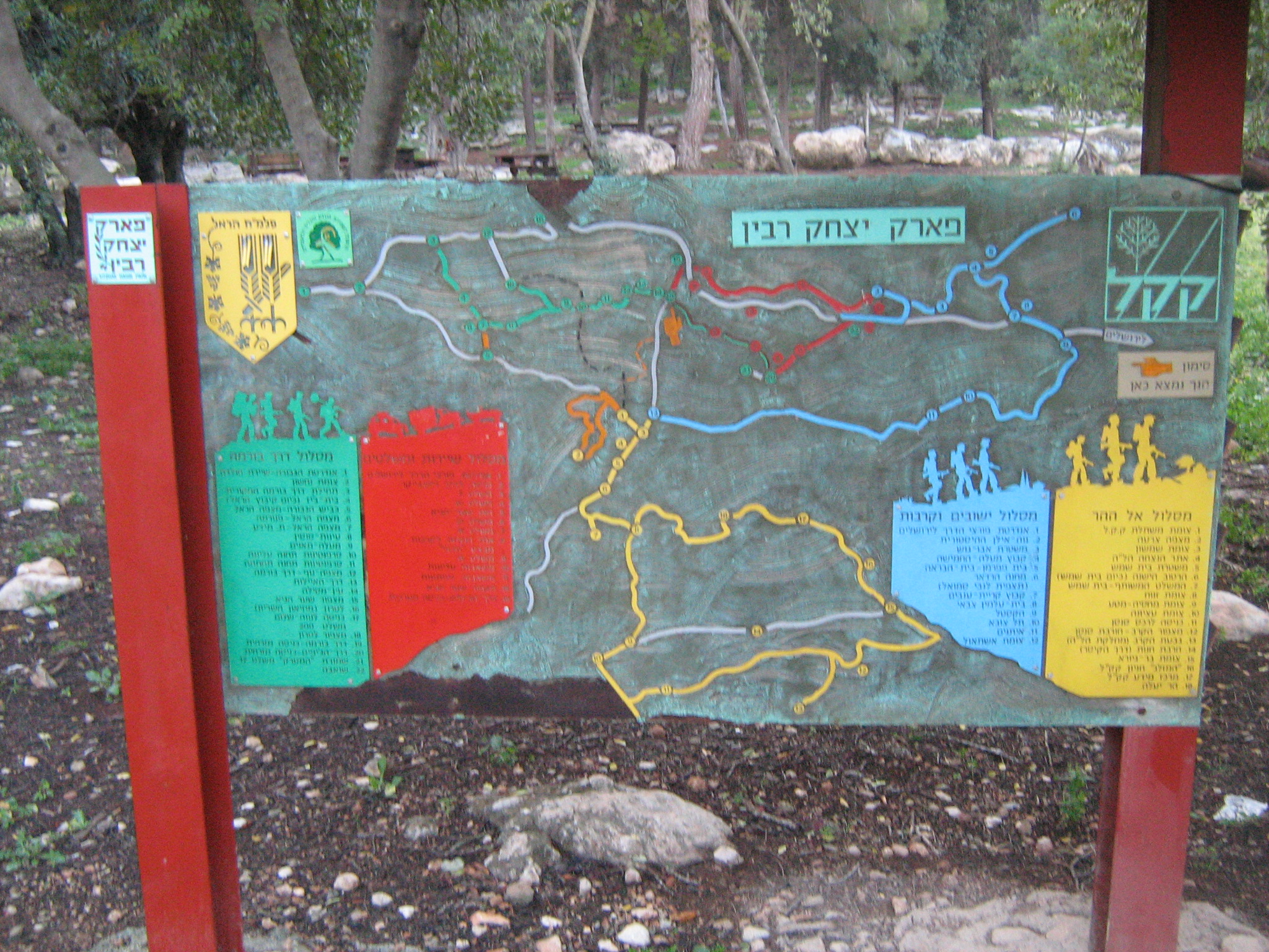 שילוט בפארק יצחק רבין סמוך לאנדרטת המח"ל